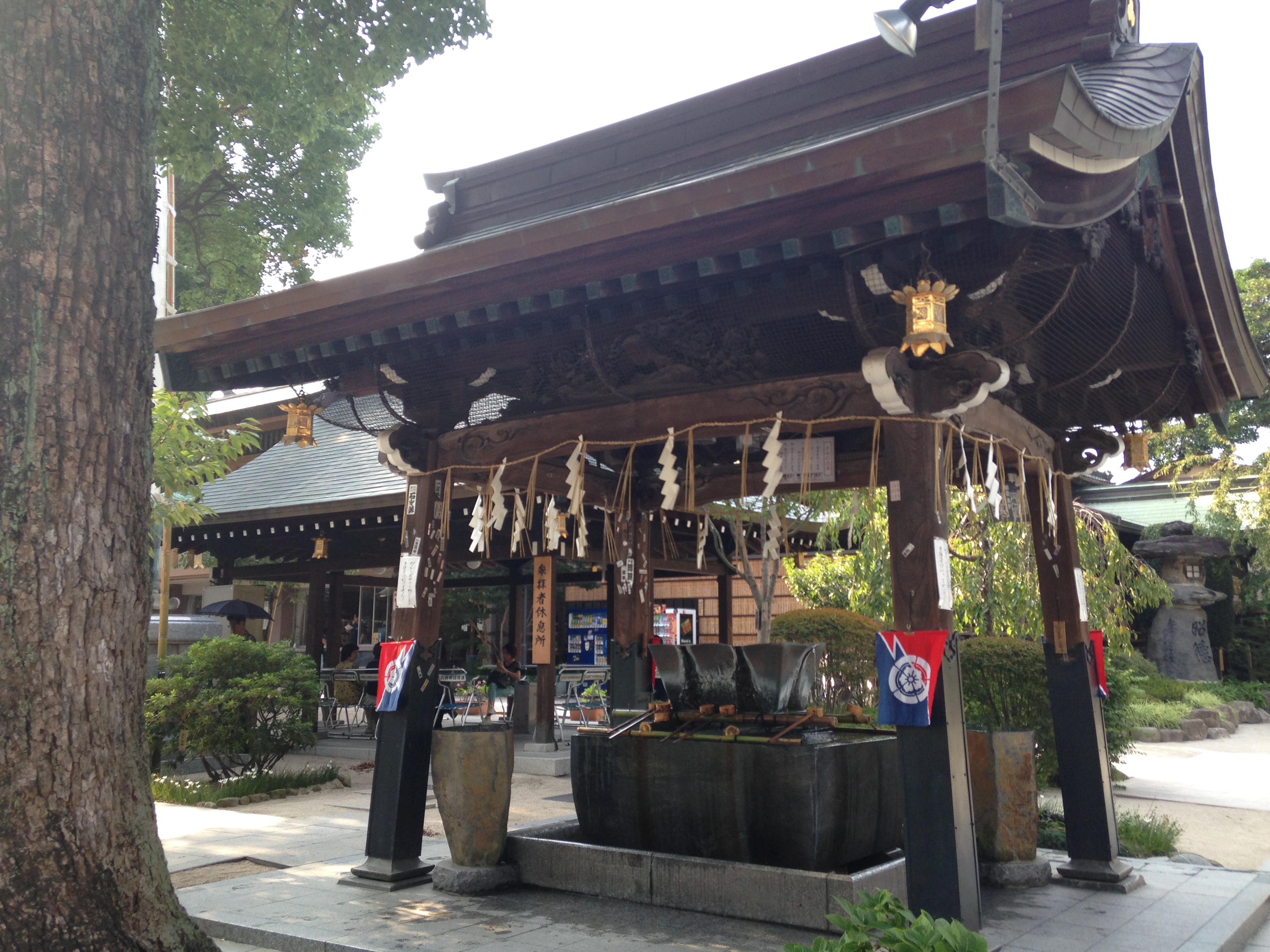 櫛田神社・手水舎と休息所